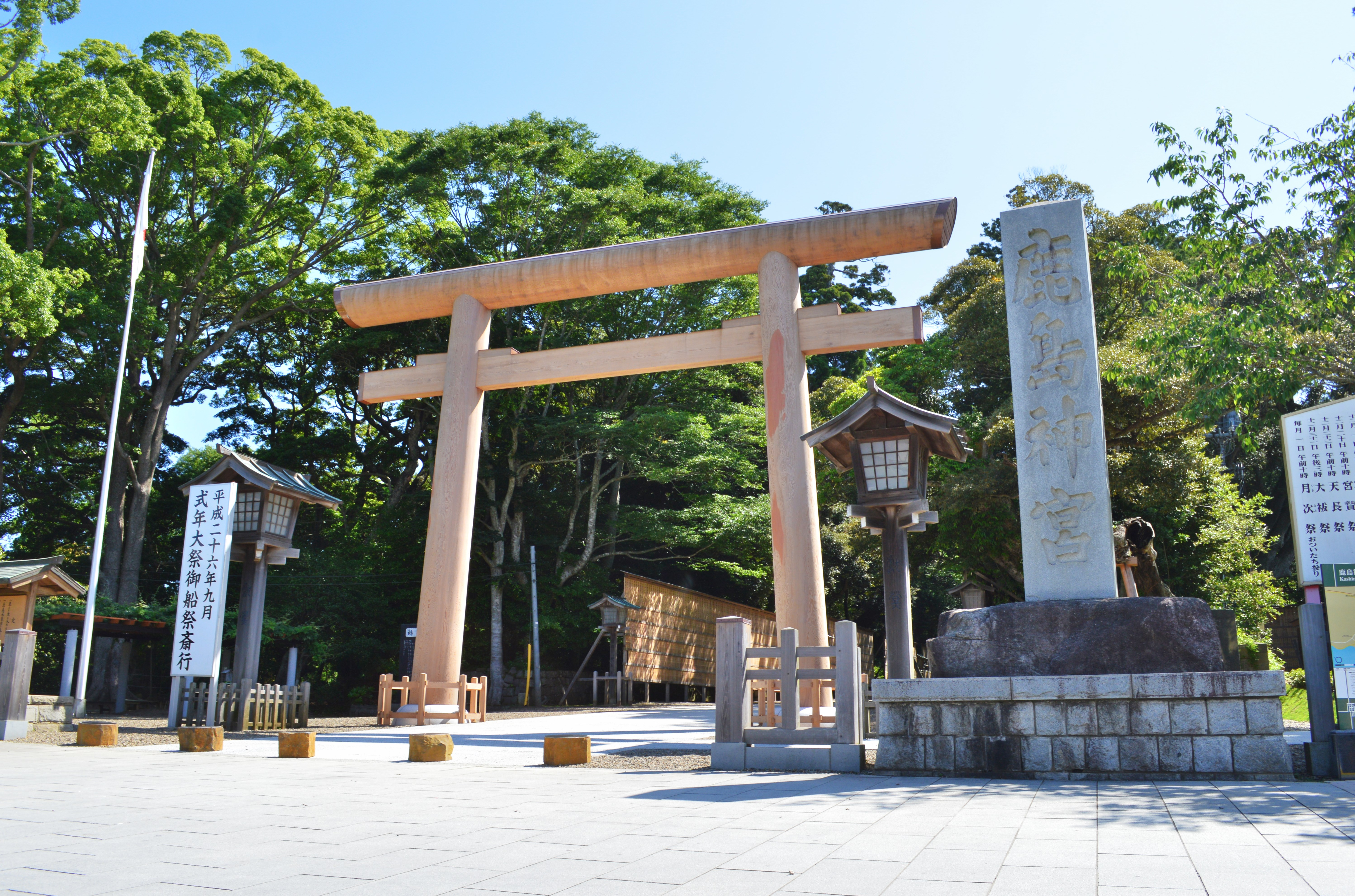 鹿島神宮 境内入り口